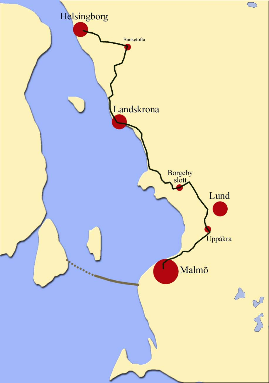 Christianloppets sträckning genom Skåne.